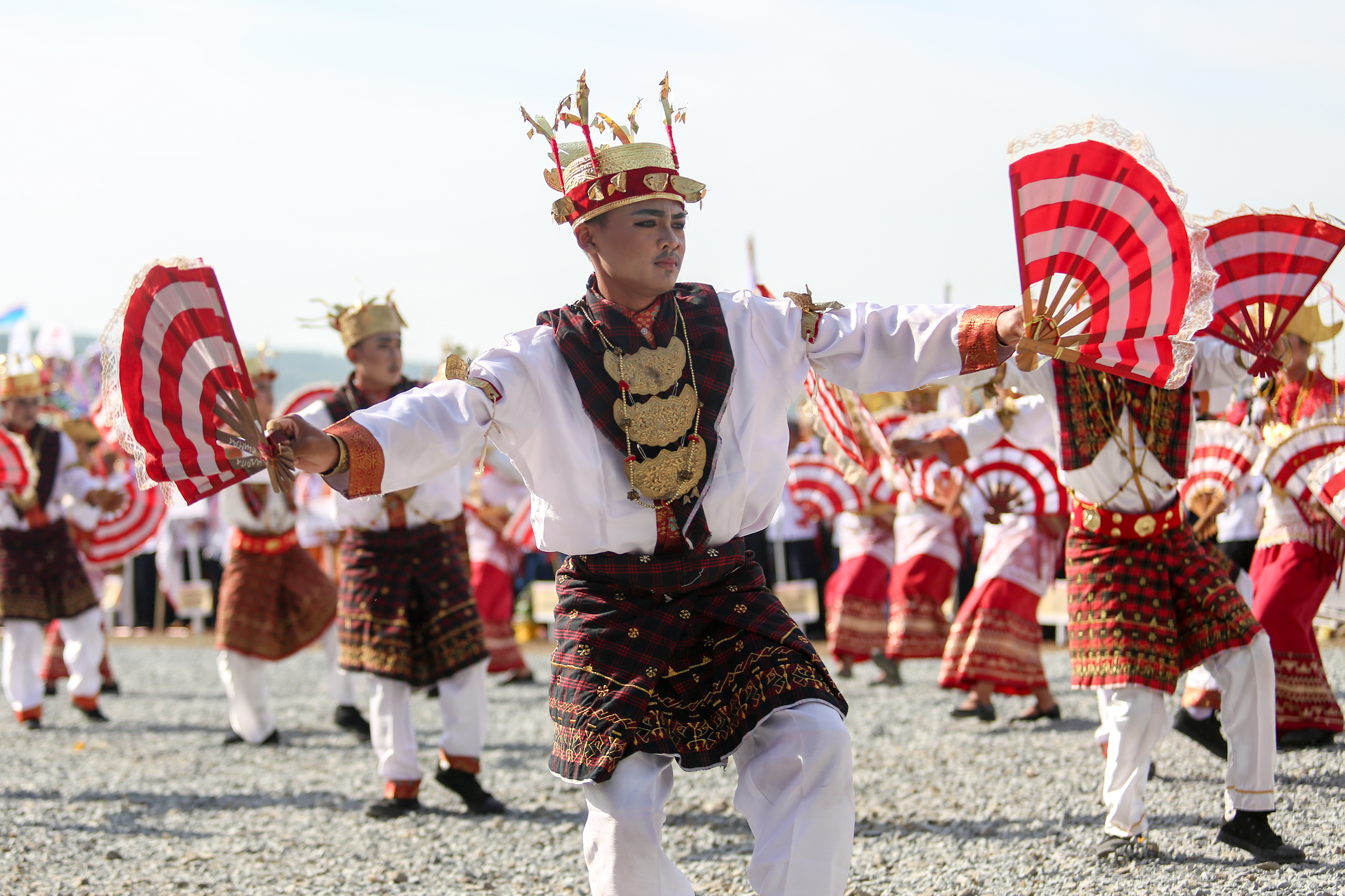 Tari Melinting yang berasal dari Lampung saat pembukaan Temu Karya PMI di Purwakarta (17/09)